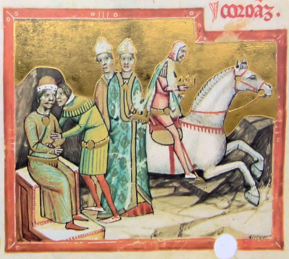 II. László magyar király